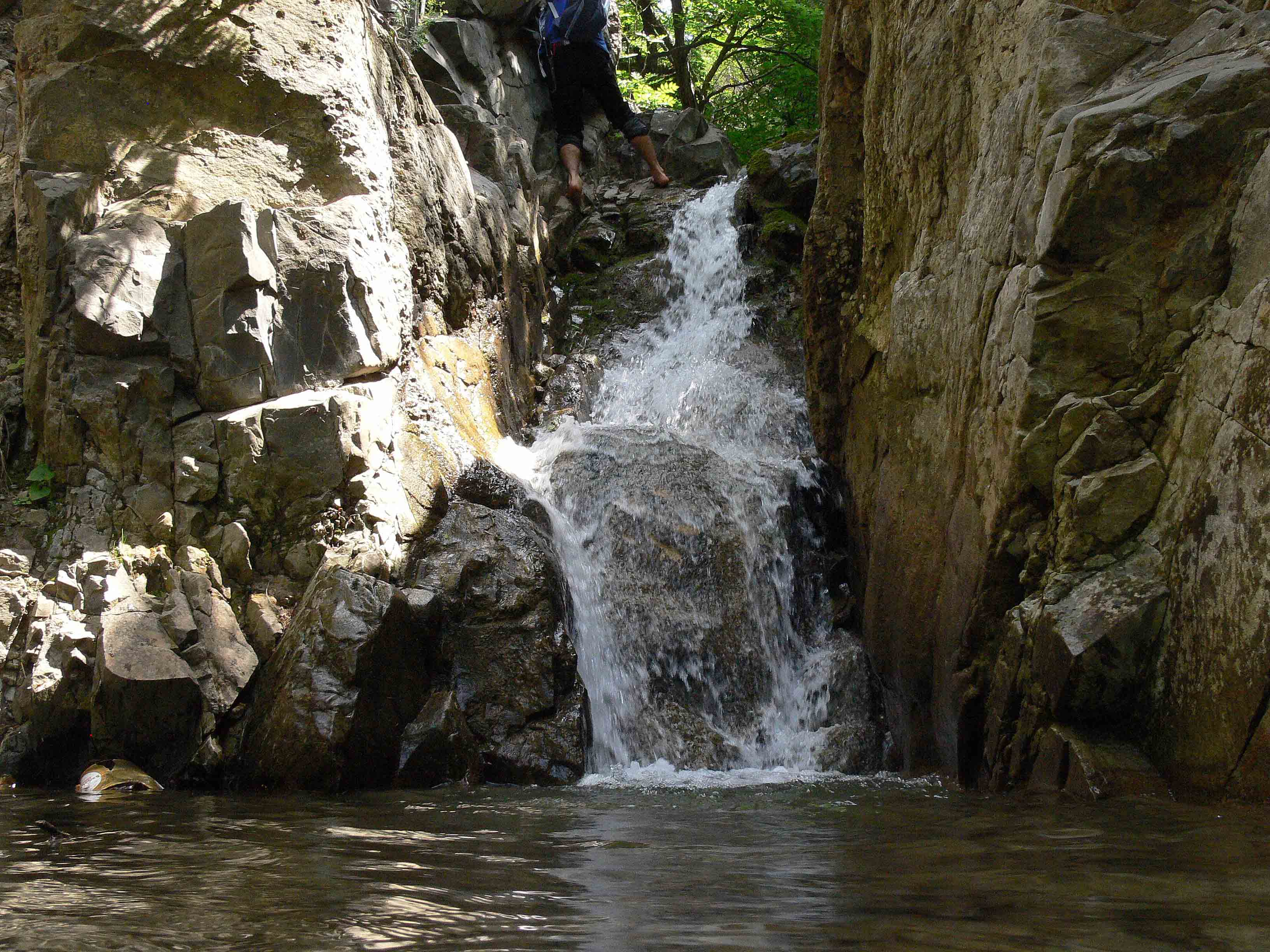 Armazi falls